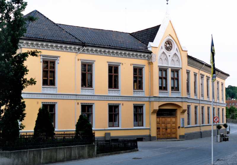 Storgata 7, Halden, Norway.